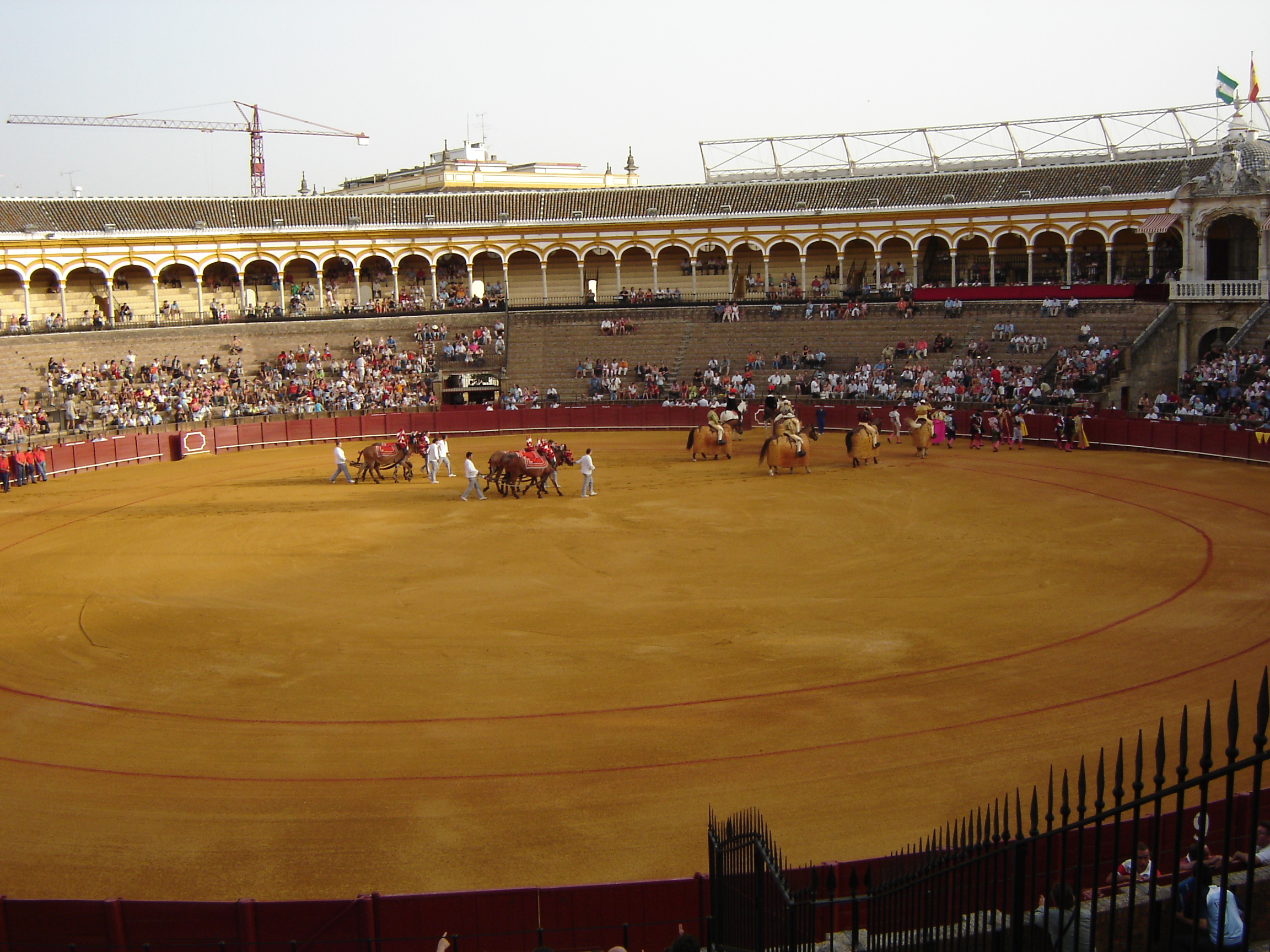 Plaza de toros interior, Corrida beginning, Sevilla (Spain)